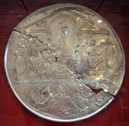 ARTE SOBRE PLATA, MUSEO ARTE ROMANO MÉRIDA, ESPAÑA.